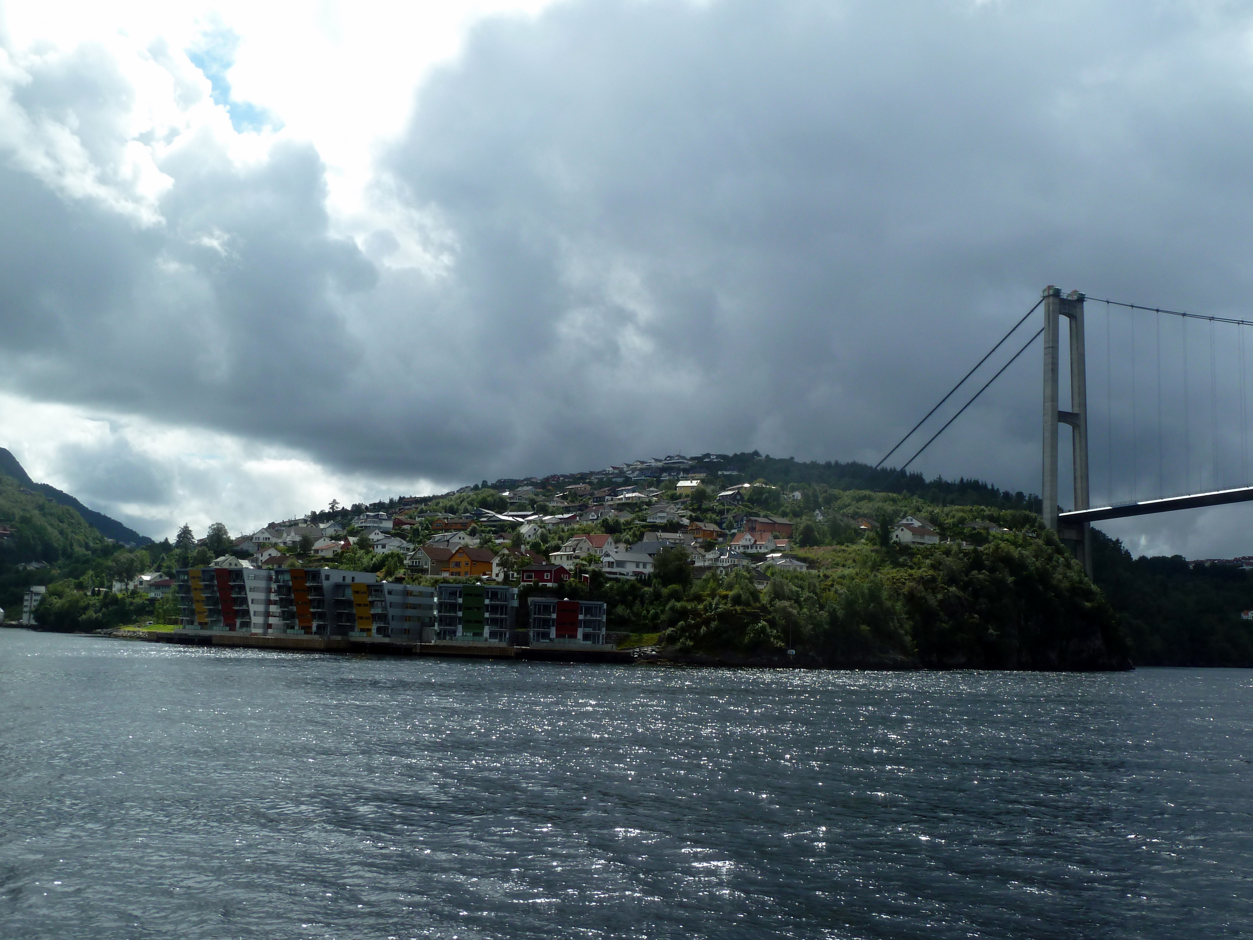 2010-08-06 - Bergen - Panoramafahrt - Kjøkkelvik